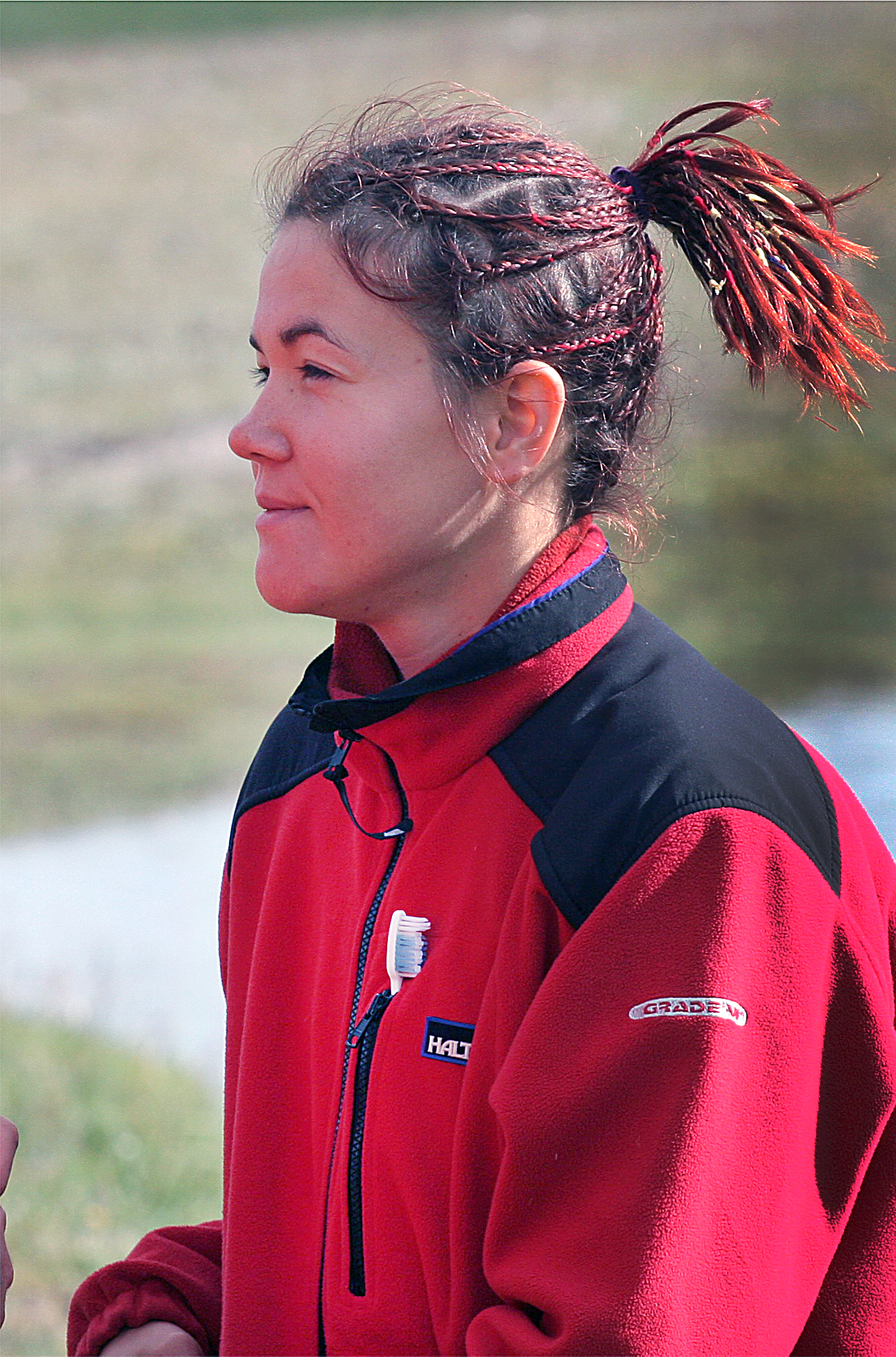 Kristiina Kindel